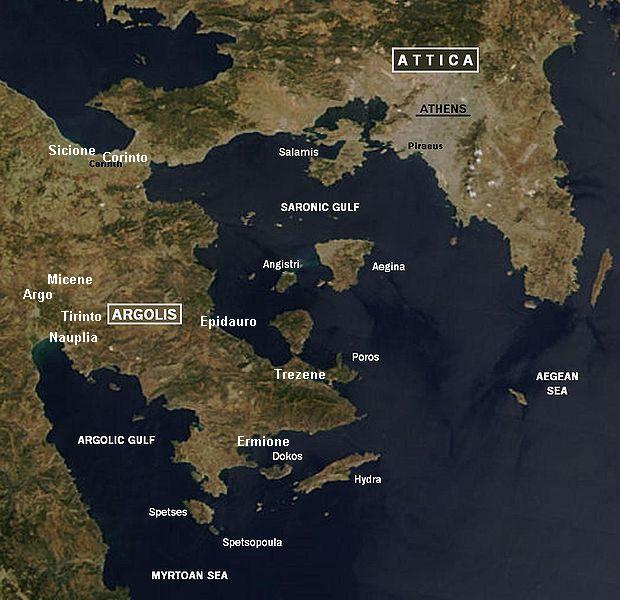 Argolide e Golfo di Saronicco, Grecia